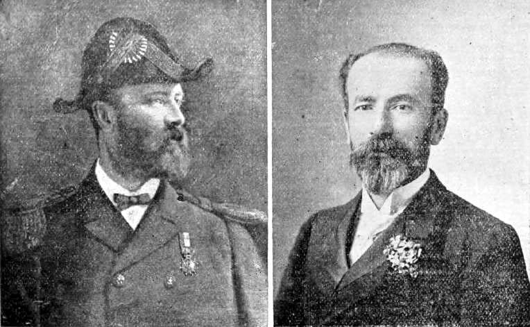 Los iniciadores del ferrocarril trasandino Juan E. Clarck (izquierda) y Mateo Clark (derecha). Fotografias en revista Pluma y Lápiz (1900-1904).